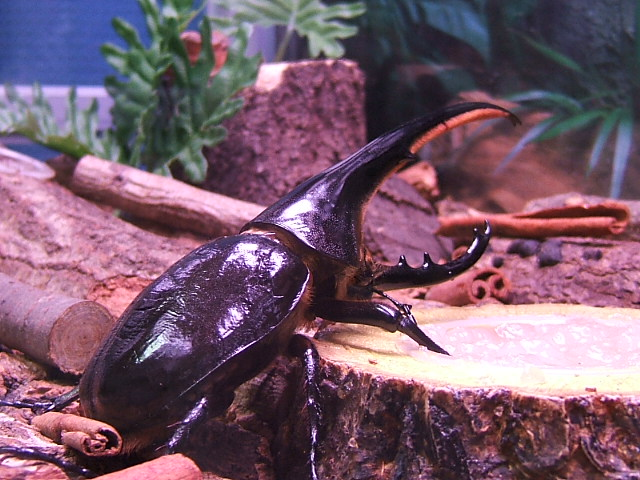 ヘラクレスオオカブトの写真